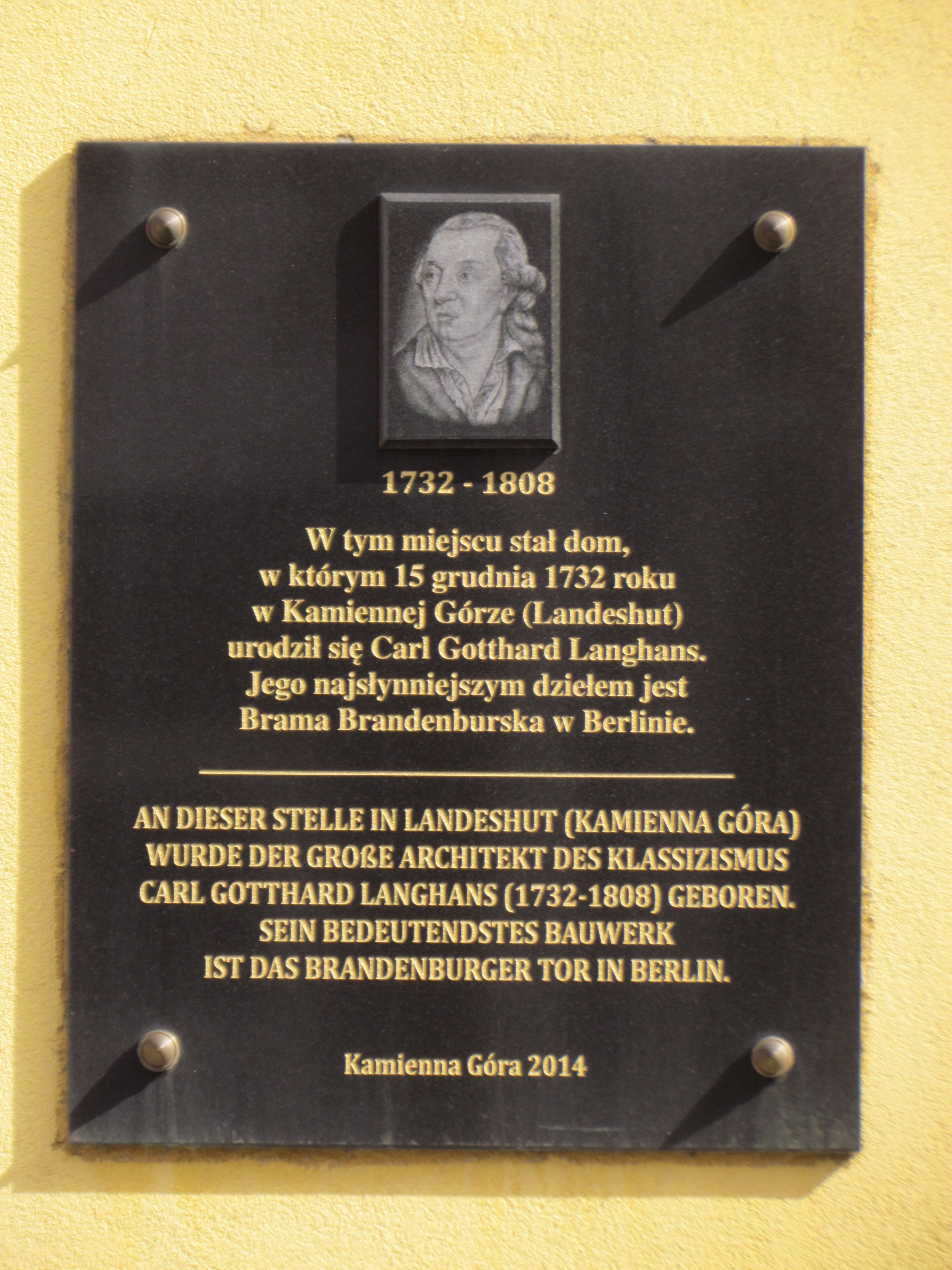 Płyta pamięci Carla Gottharda Langhansa architekta m.in. Bramy Brandenburskiej w Berlinie na budynku Szkoły Podstawowej w Kamiennej Górze (Plac Kościelny 1)